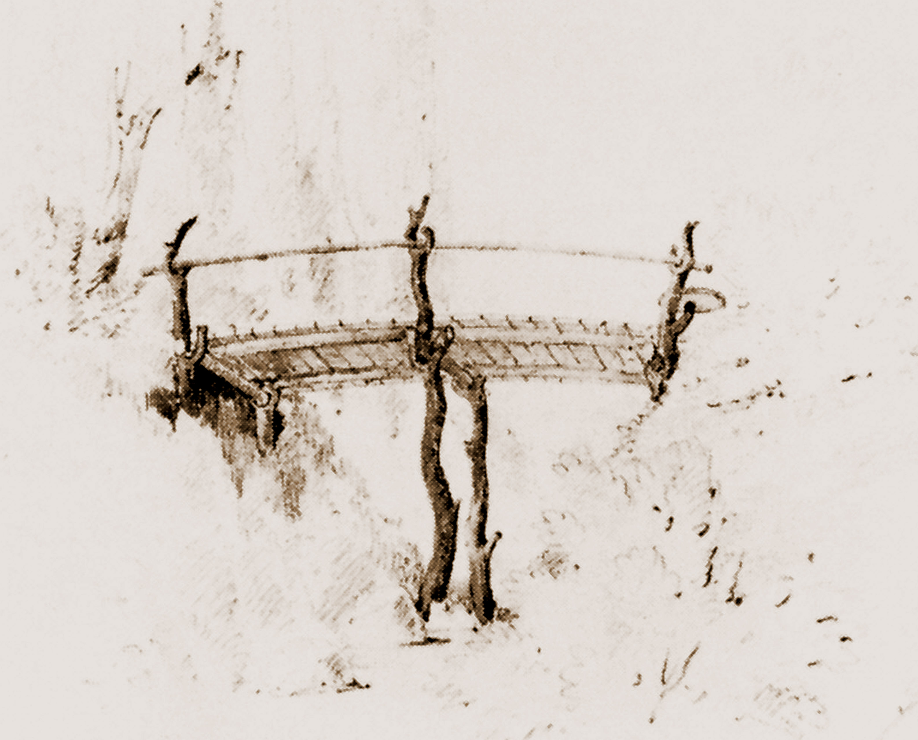 Knüppelholzbrücke, Entwurf von Persius für den Park Klein-Glienicke